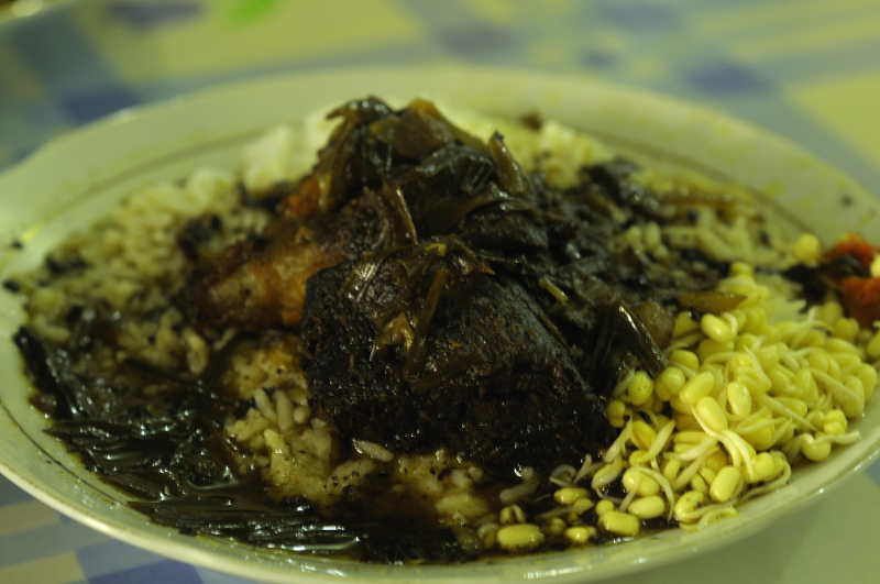 Nasi Rawon Empal Kisi, Bik Atik, Banyuwangi, Jawa Timur